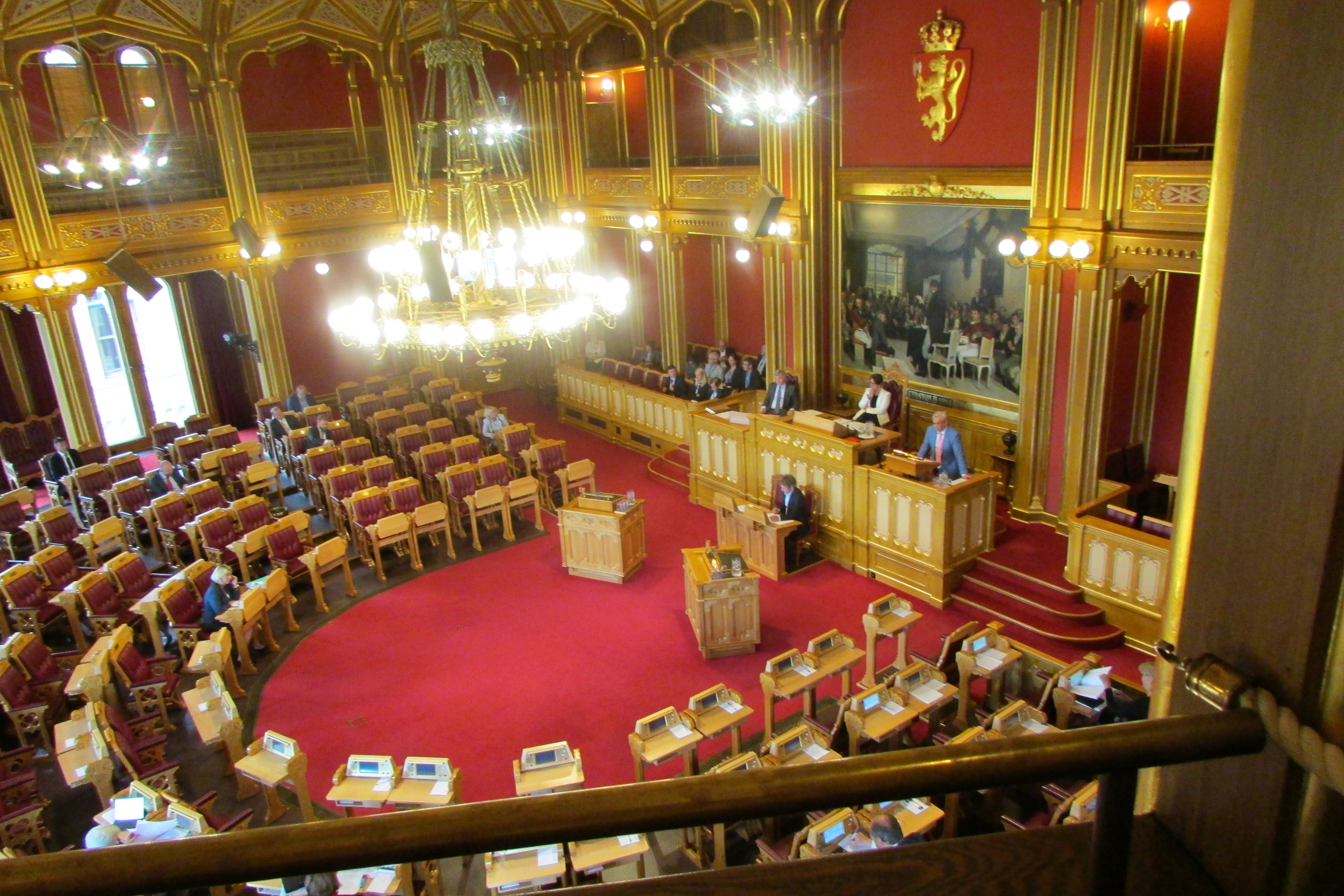 Stortingssalen, Stortingsbygningen